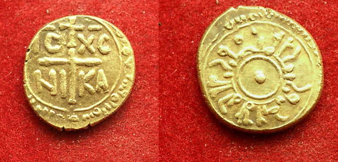 Gold-Münze: Multiplo di Tarí 13 mm 2,20 g, Tankred von Lecce (1130-1194), Sizilien